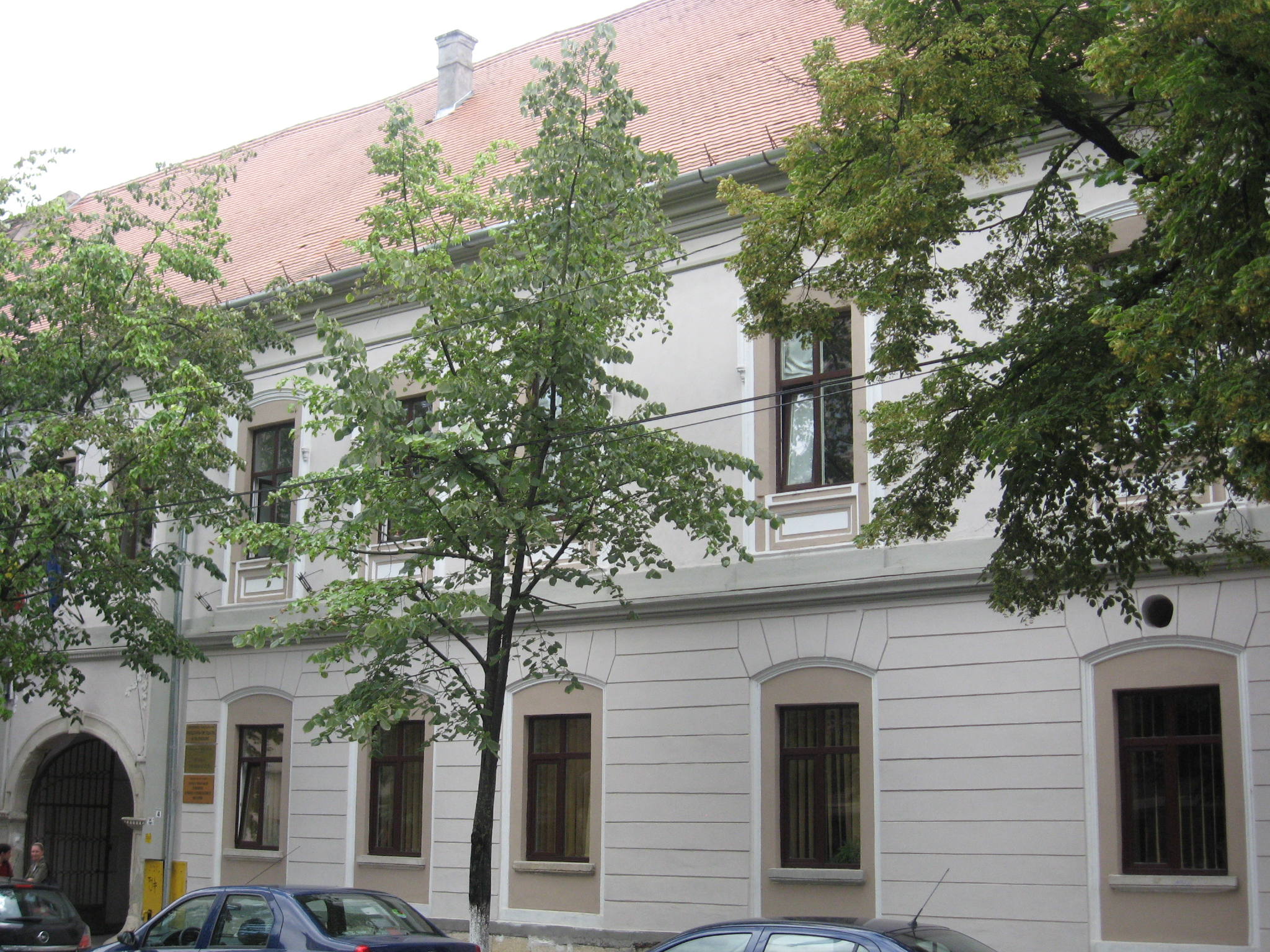 Cluj-Napoca, str. M.Kogălniceanu (Casa Karacsay)